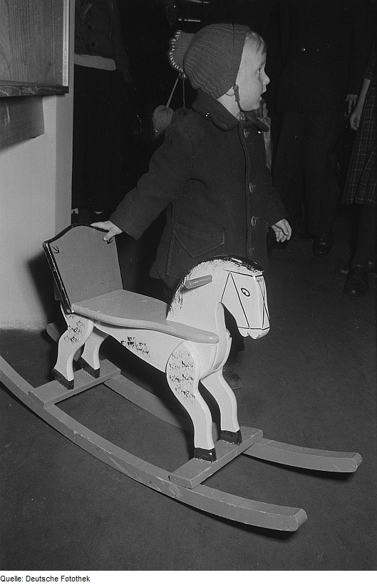 Original image description from the Deutsche Fotothek Ein Kleinkind neben einem Schaukelpferd in einer bulgarischen Volkskunstausstellung